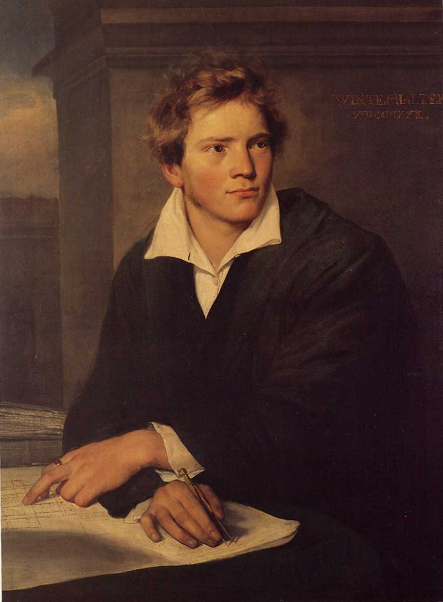 Josef Berckmüller, Zeichner und Architekt in Karlsruhe um 1830